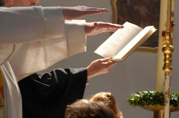 Feierlicher Trauungssegen durch einen katholischen Priester während einer ökumenische Trauung. Der Priester spricht den Segen, während er über die Brautleute die Arme ausstreckt. Zu dessen Linken: ein evangelischer Pfarrer.